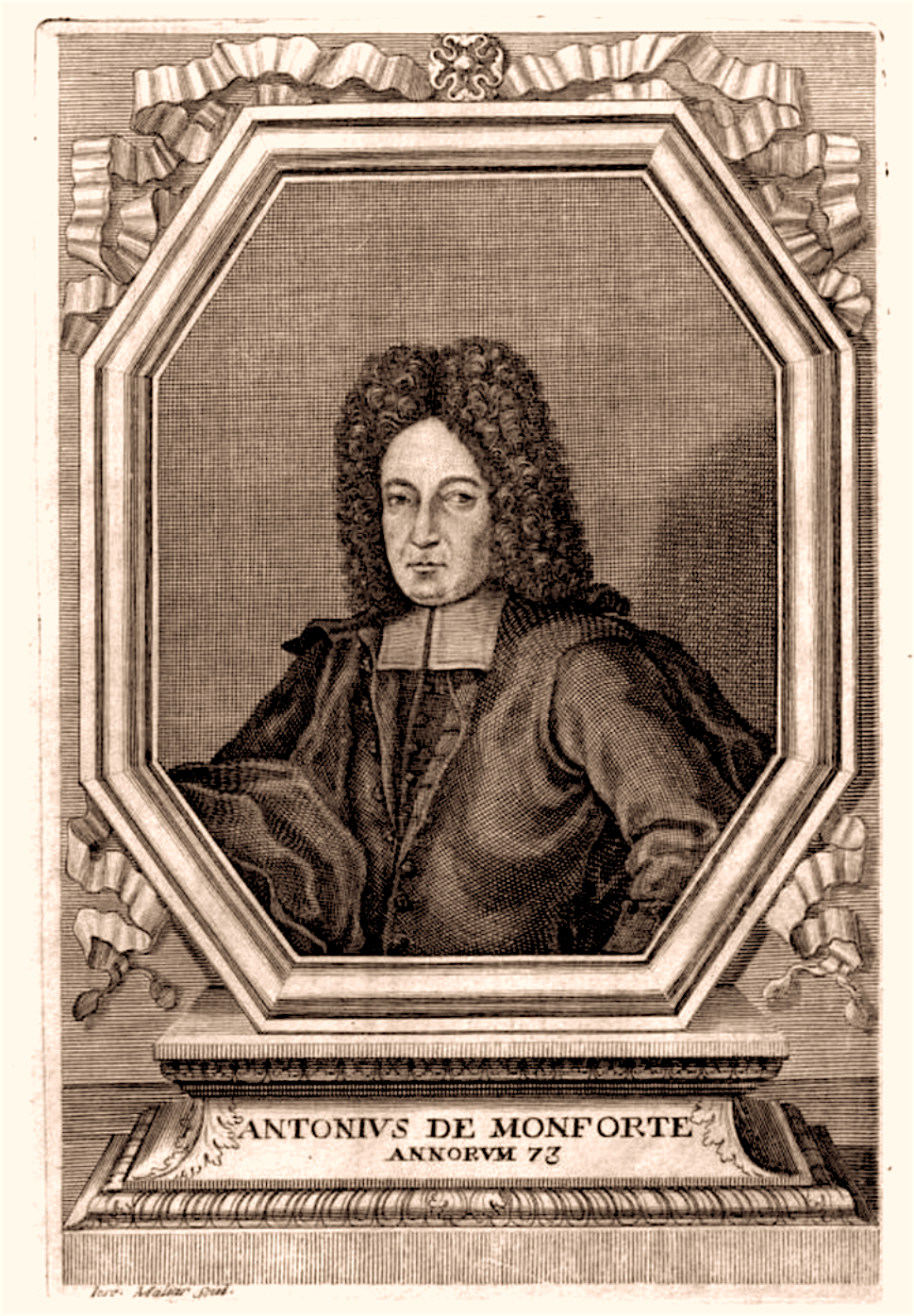 Ritratto calcografico di Antonio de Monforte realizzato da Giuseppe Maliar nel 1717